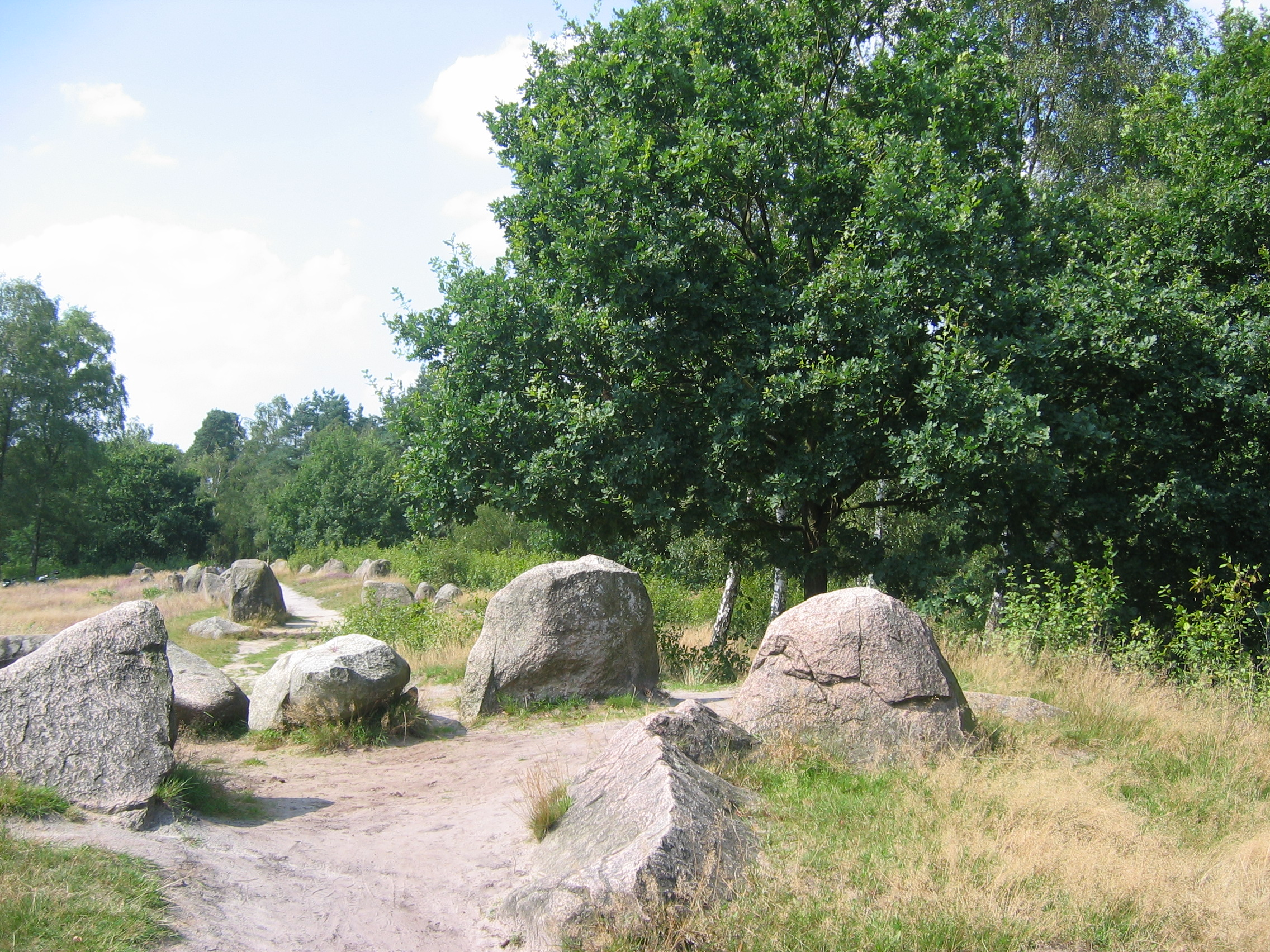 Dötlingen-Teil der zerstörten Großsteingräber